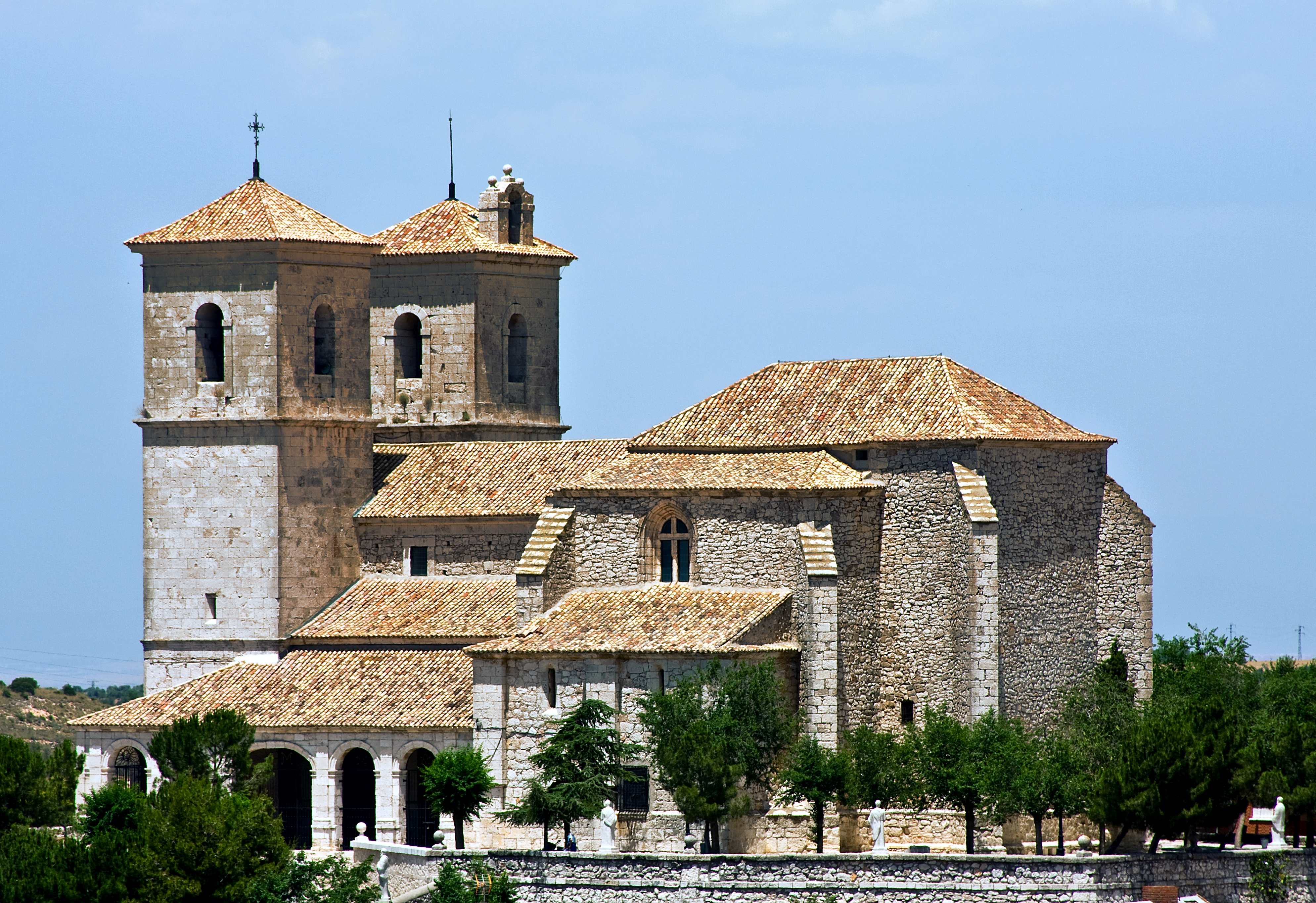 Campo Real - Santa Maria del Castillo18